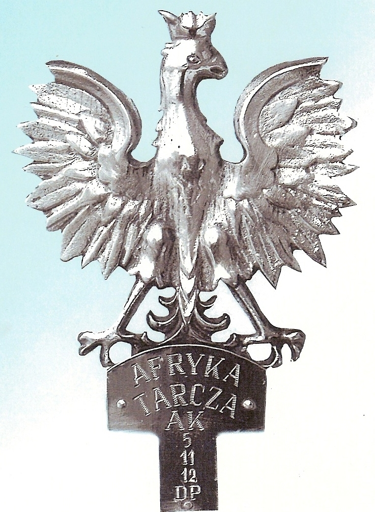 Sztandar Obszaru Lwowskiego AK